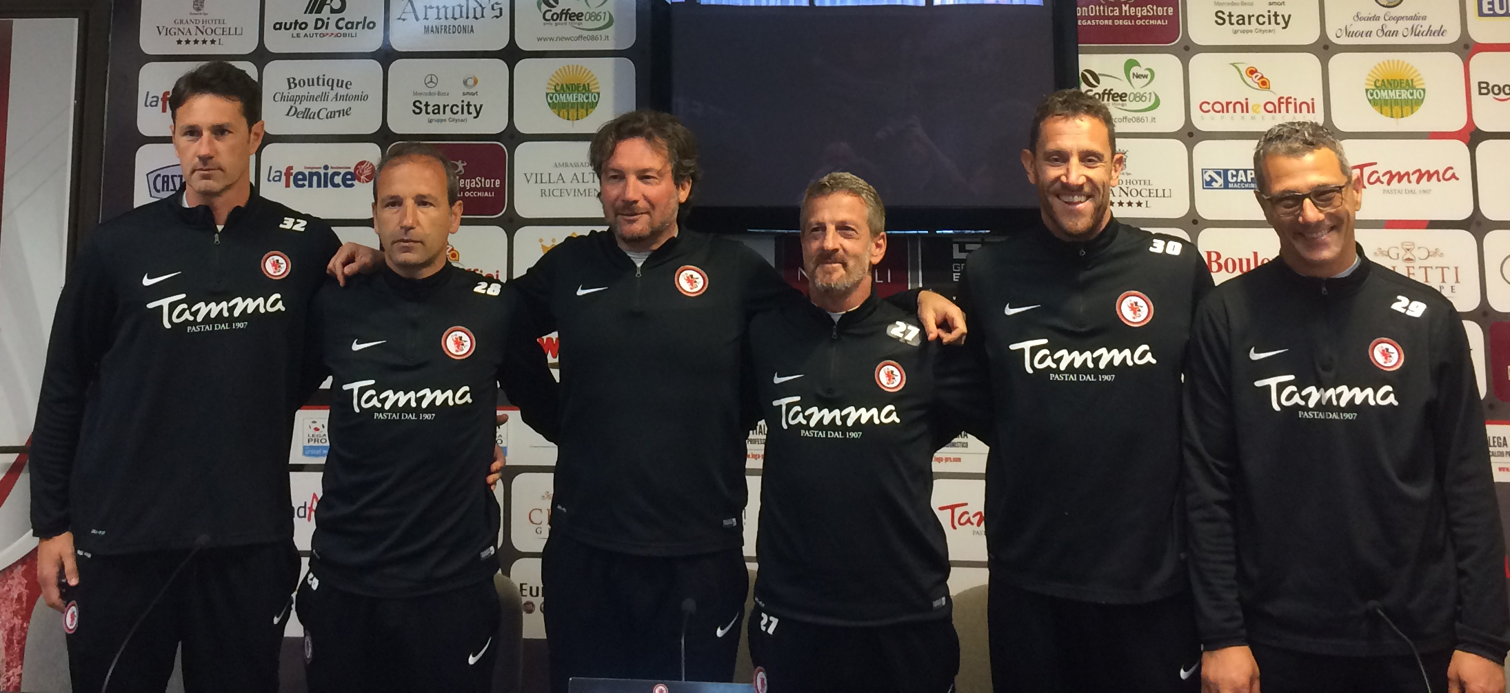 Giovanni Stroppa ed il suo staff prima di Foggia-Melfi, 37a giornata del campionato di Lega Pro 2016-2017